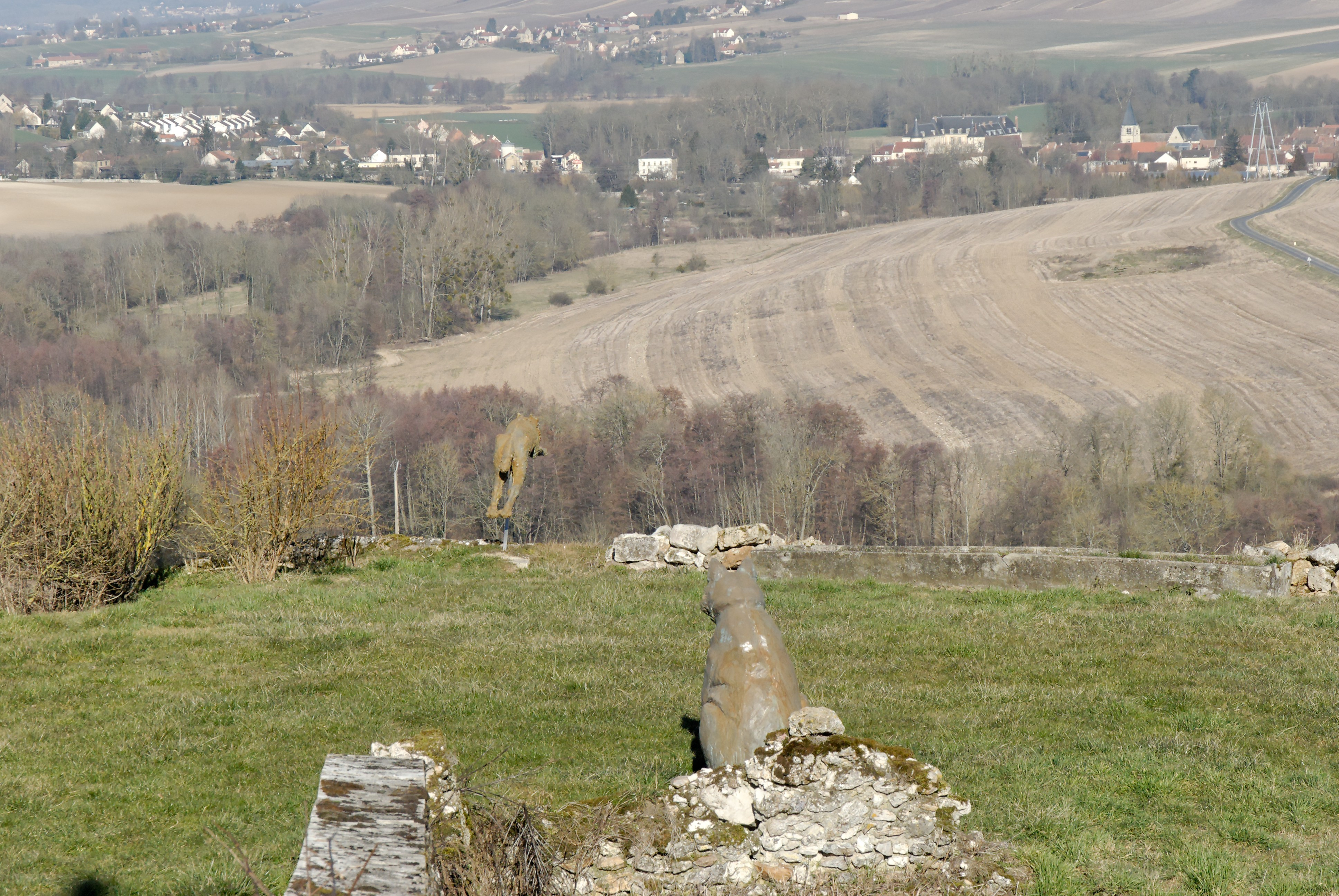 Panorama de Montigny-lès-Condé.